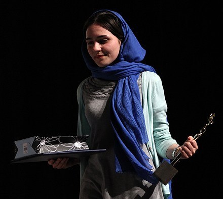 مونا احمدی در اختتامیه جشنواره تئاتر تجربه